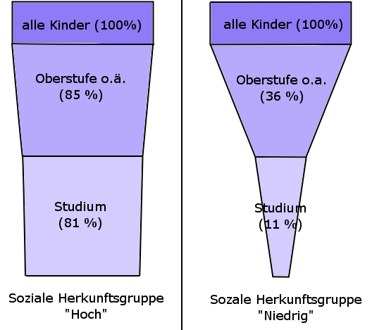 Bildungstrichter der Sozialerhebung des Deutschen Studentenwerks